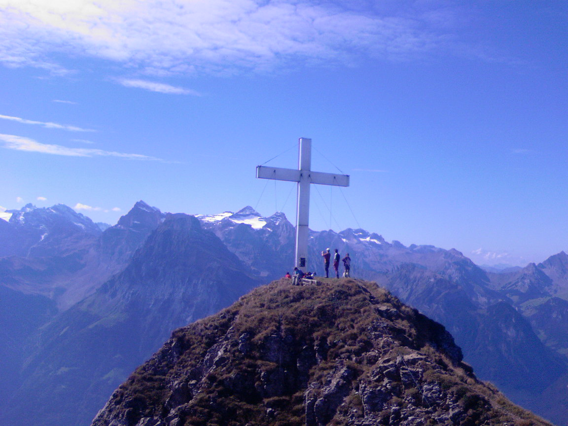 Der Gipfel des Rophaien